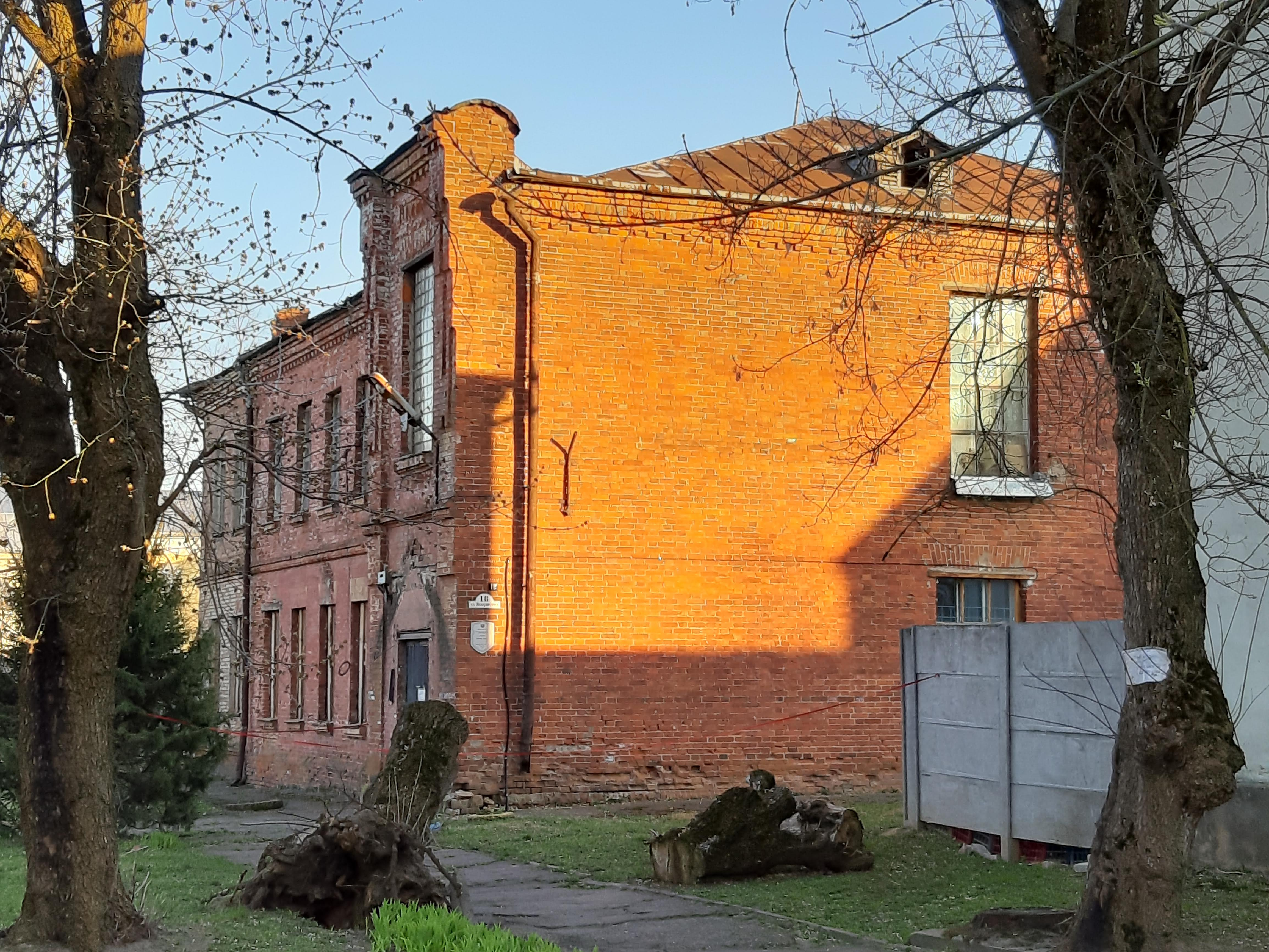 Магілёў. Вуліца Мянжынскага